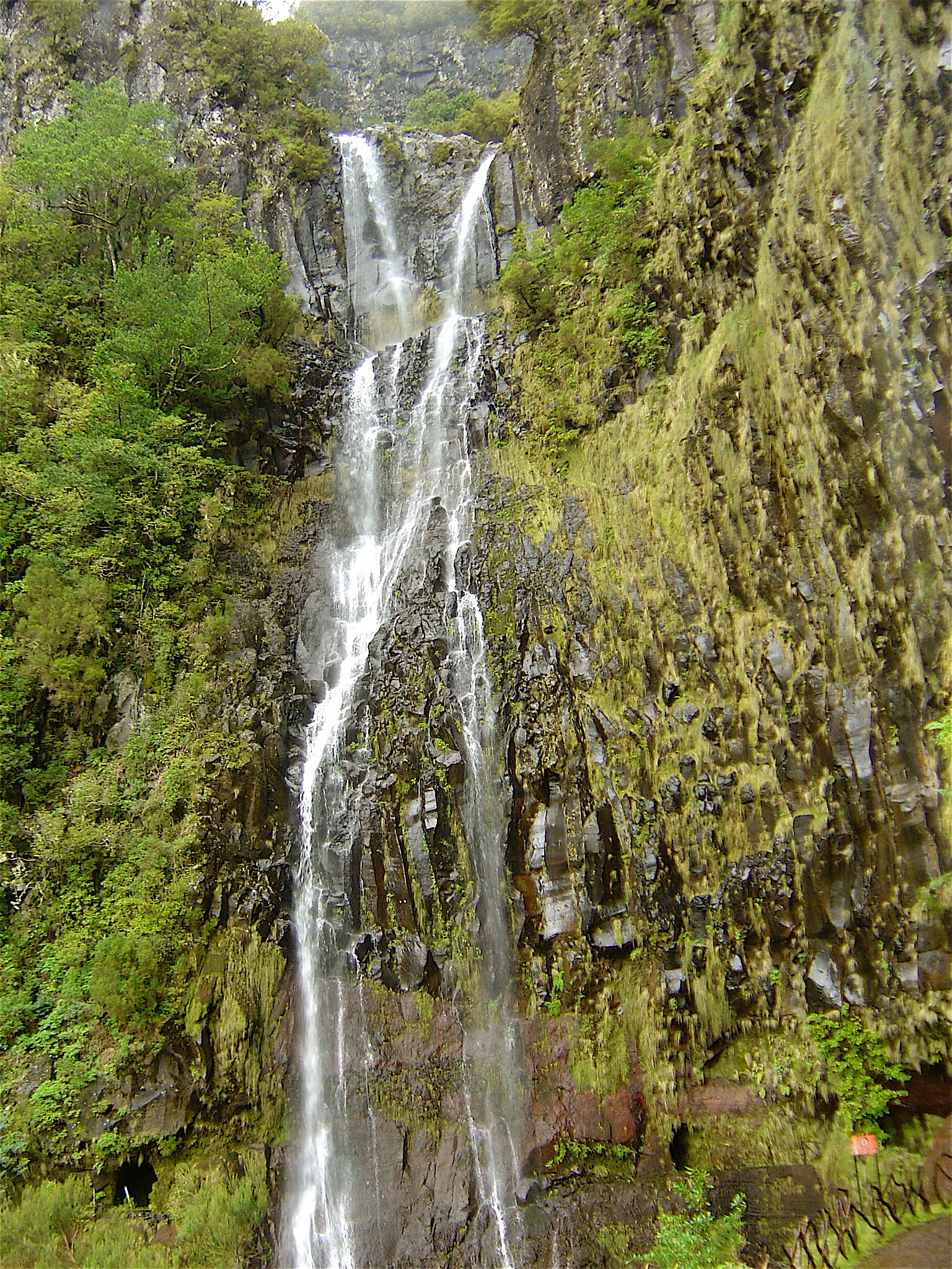 Wasserfall auf der Levada Risco